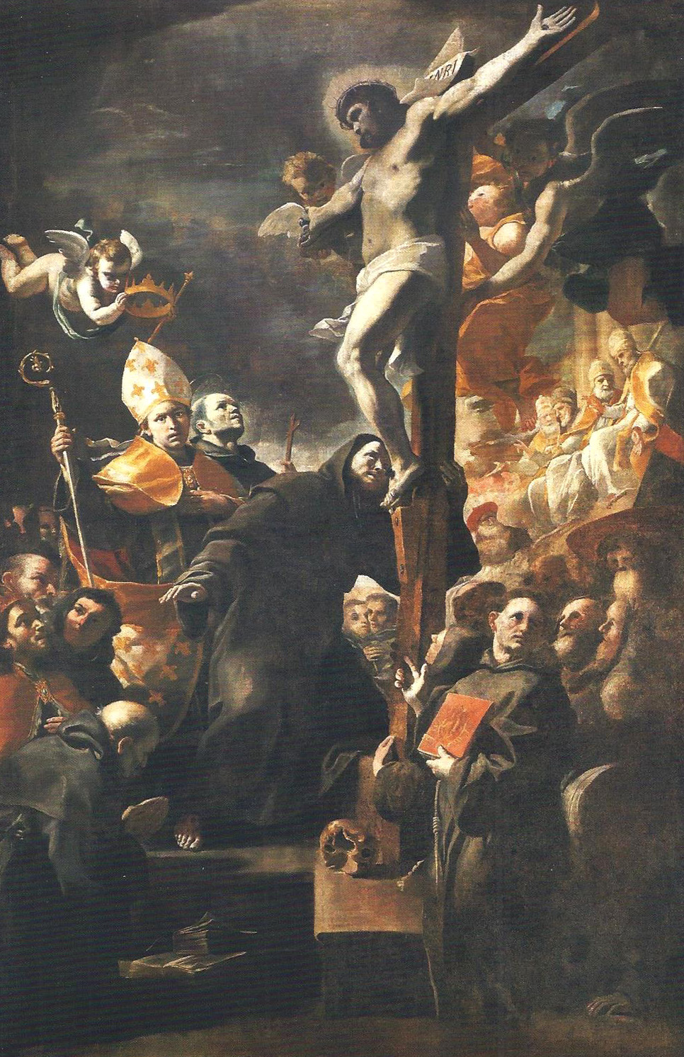 Crocefisso e santi francescani